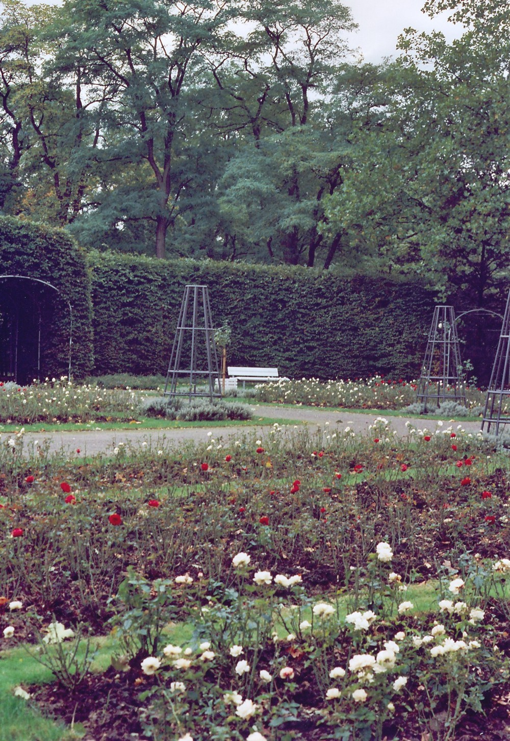 Klettenbergpark Rosengarten, Köln-Klettenberg